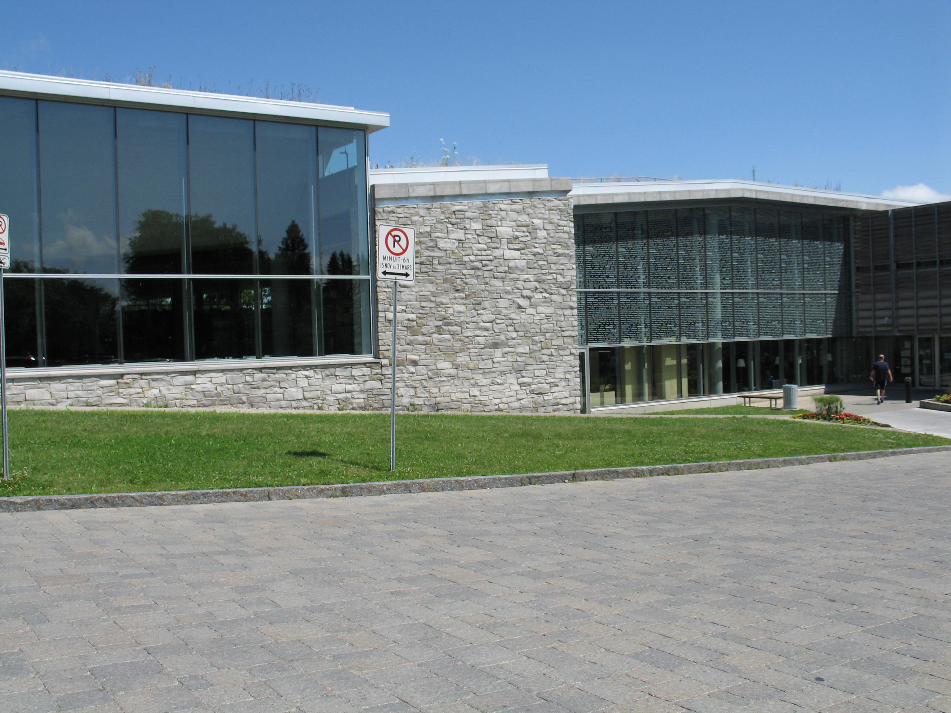 La Bibliothèque Paul-Aimé Paiement de l'arrondissement Charlesbourg de la ville de Québec a été construite en 2006 dans l'arrondissement historique du Trait-Carré, sur des plans de Croft Pelletier Architectes. Elle est chauffée et climatisée avec un système géothermique et sont toit végétal est accessible au public.